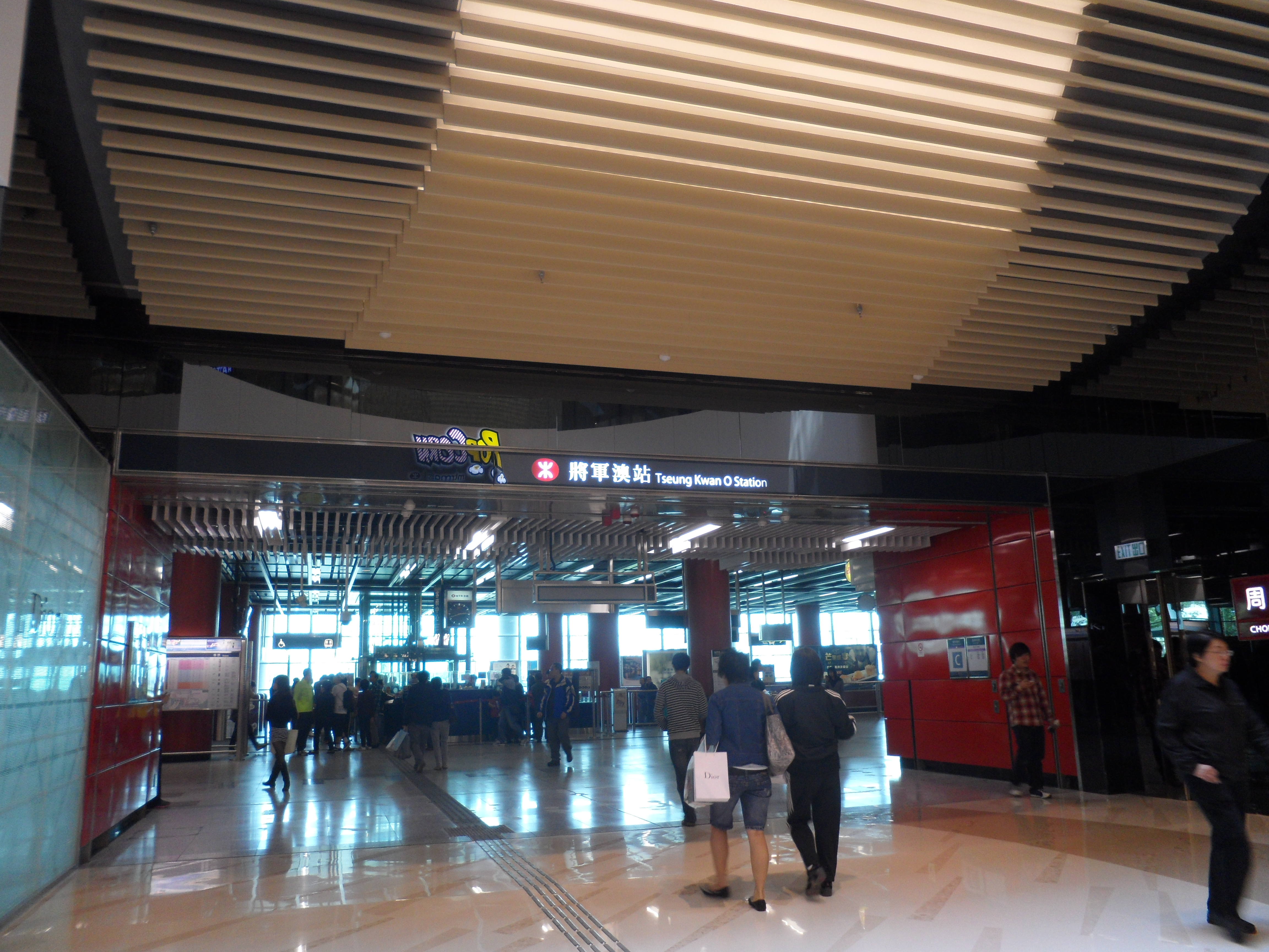 港鐵將軍澳站C出口